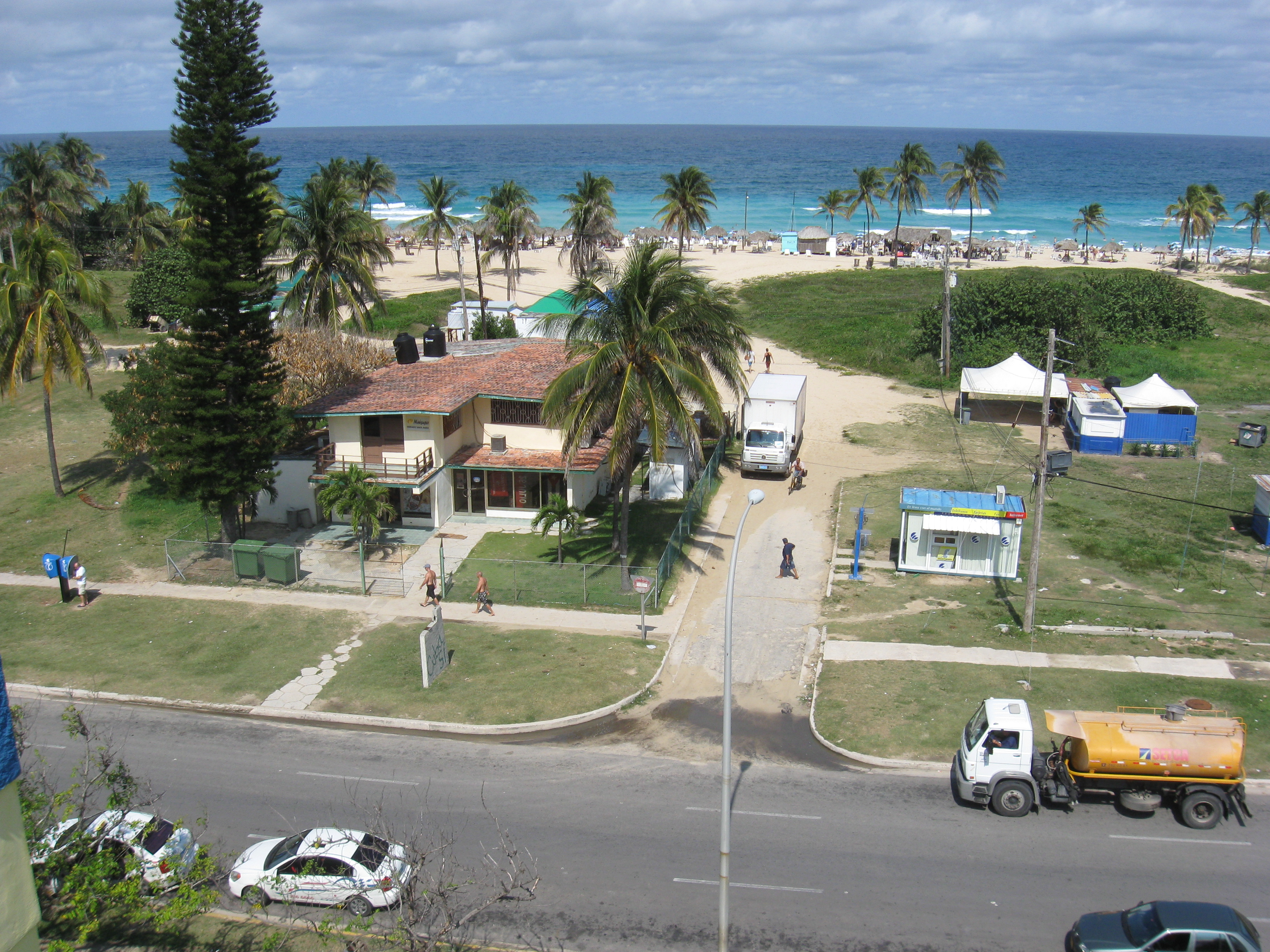 Cuba. Hotel Tropicoco